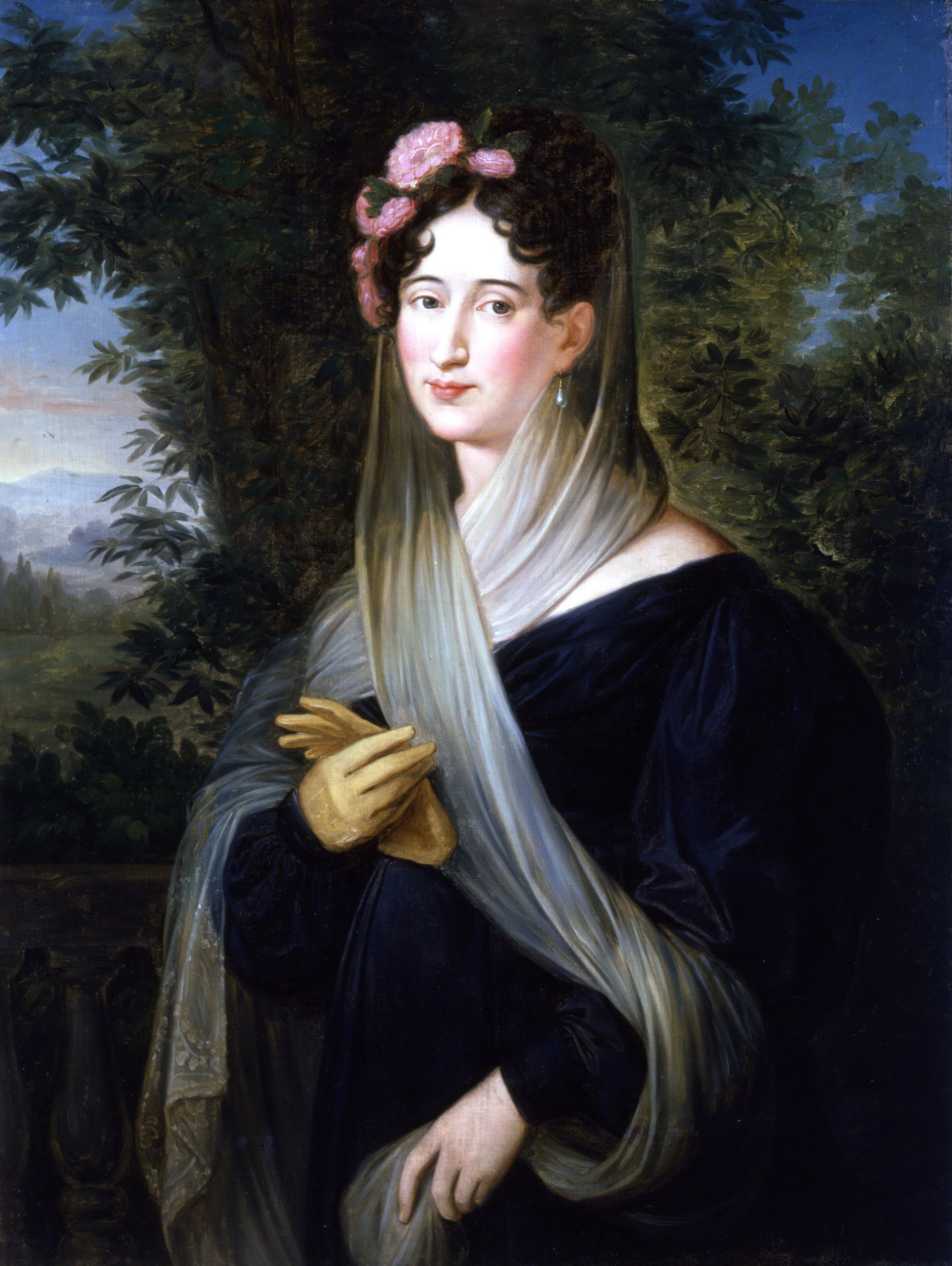 Retrato de la aristócrata española Josefa Tudó (1779-1869), que fue amante de Manuel Godoy.